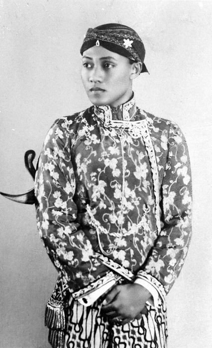 Repronegatief. Pangeran Hadipati Hario Praboe Soerjodilogo / Pakoe Alam VIII in Javaanse kleding